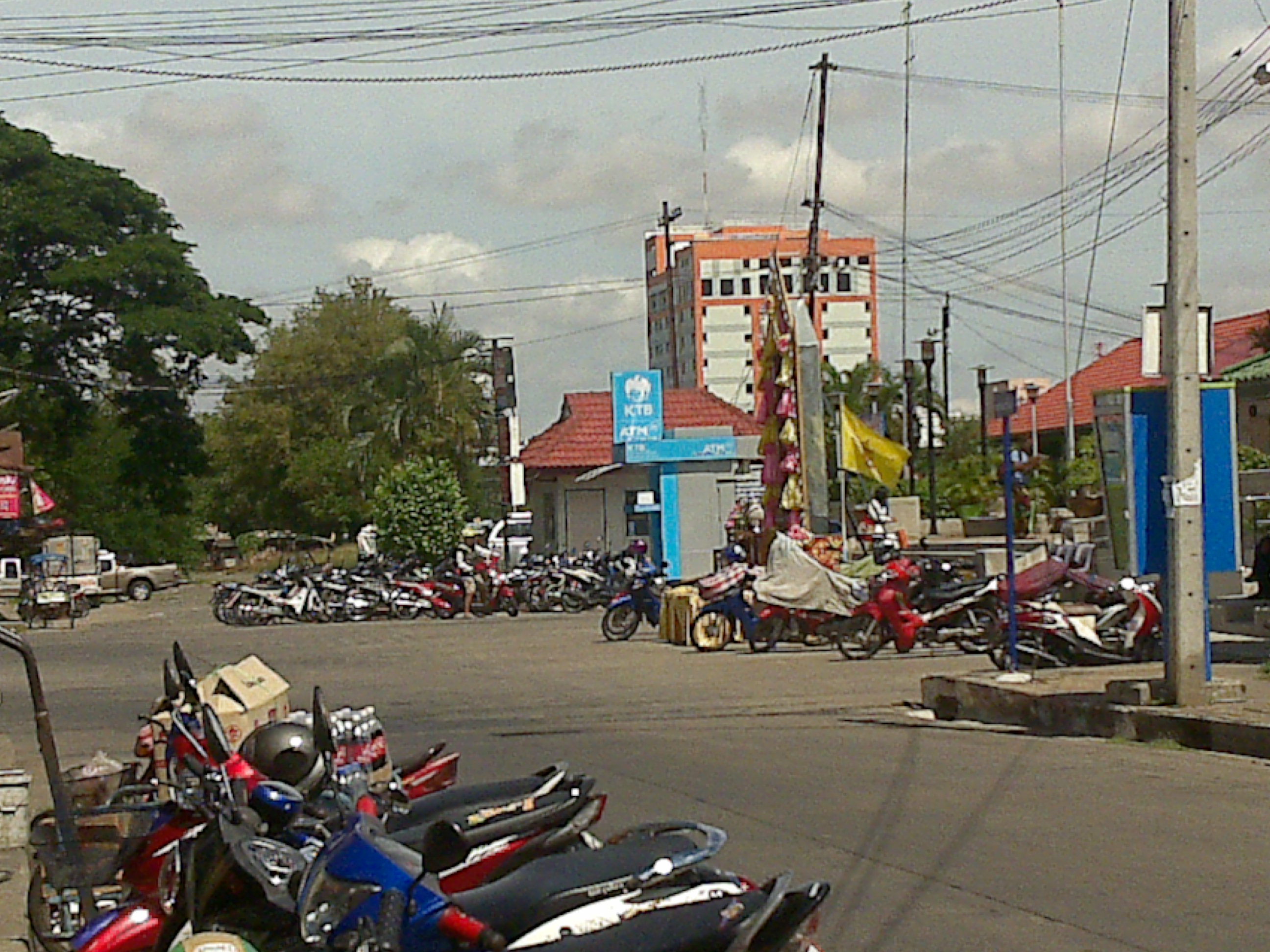 ที่จอดรถที่สถานีรถไฟบุรีรัมย์